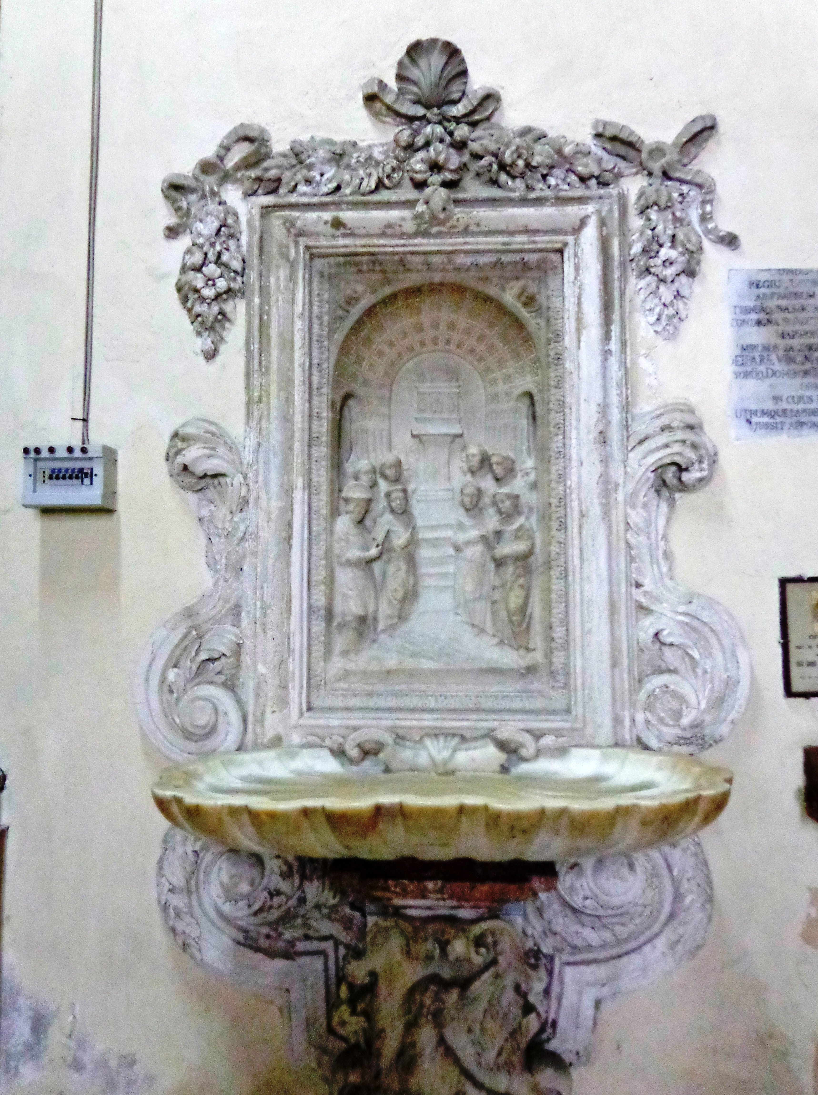 San Domenico PA 06